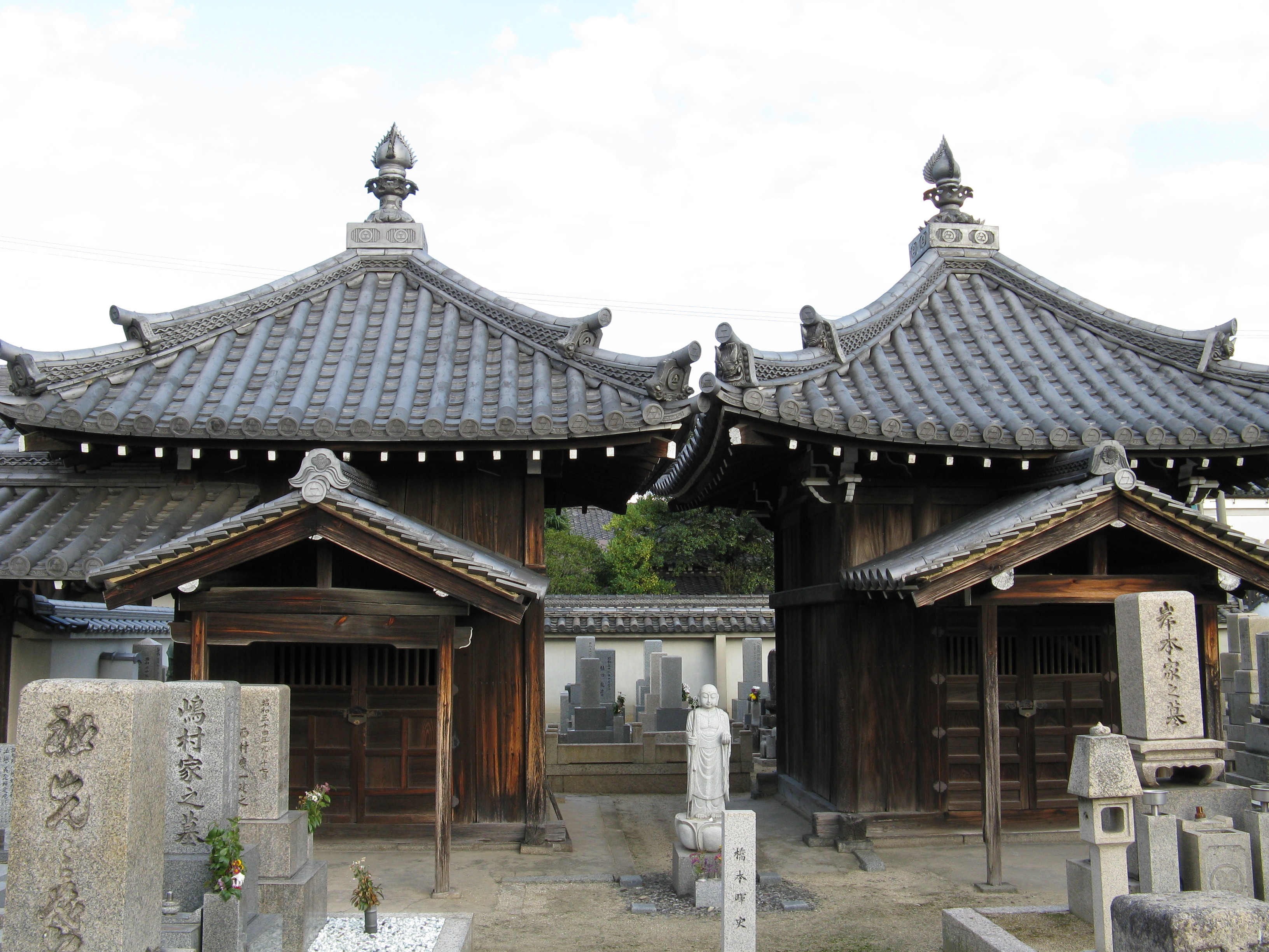 本誓寺 左側・広徳院（平野長発）廟と右側・本覚院（平野長勝）廟